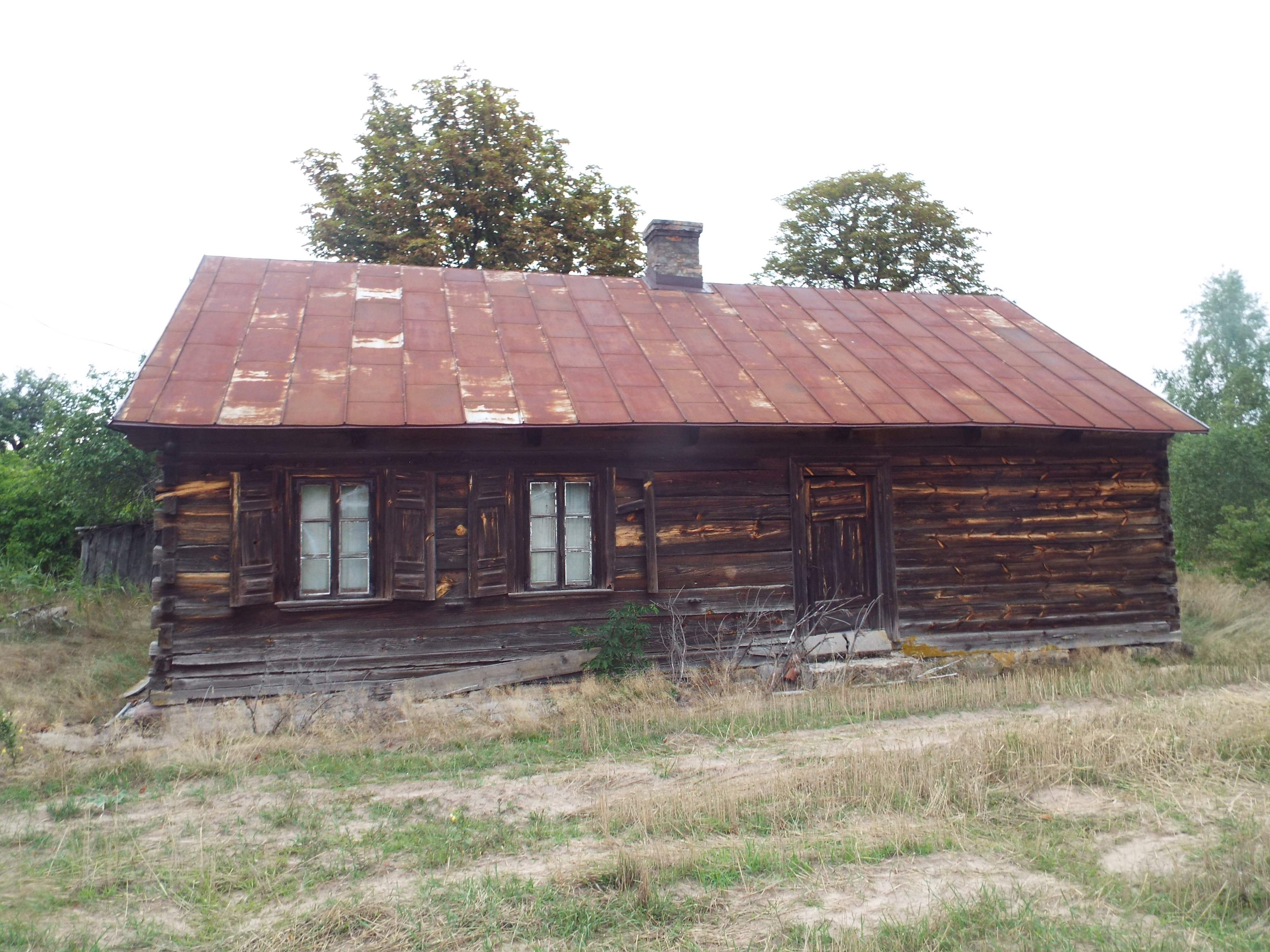 Tuczna